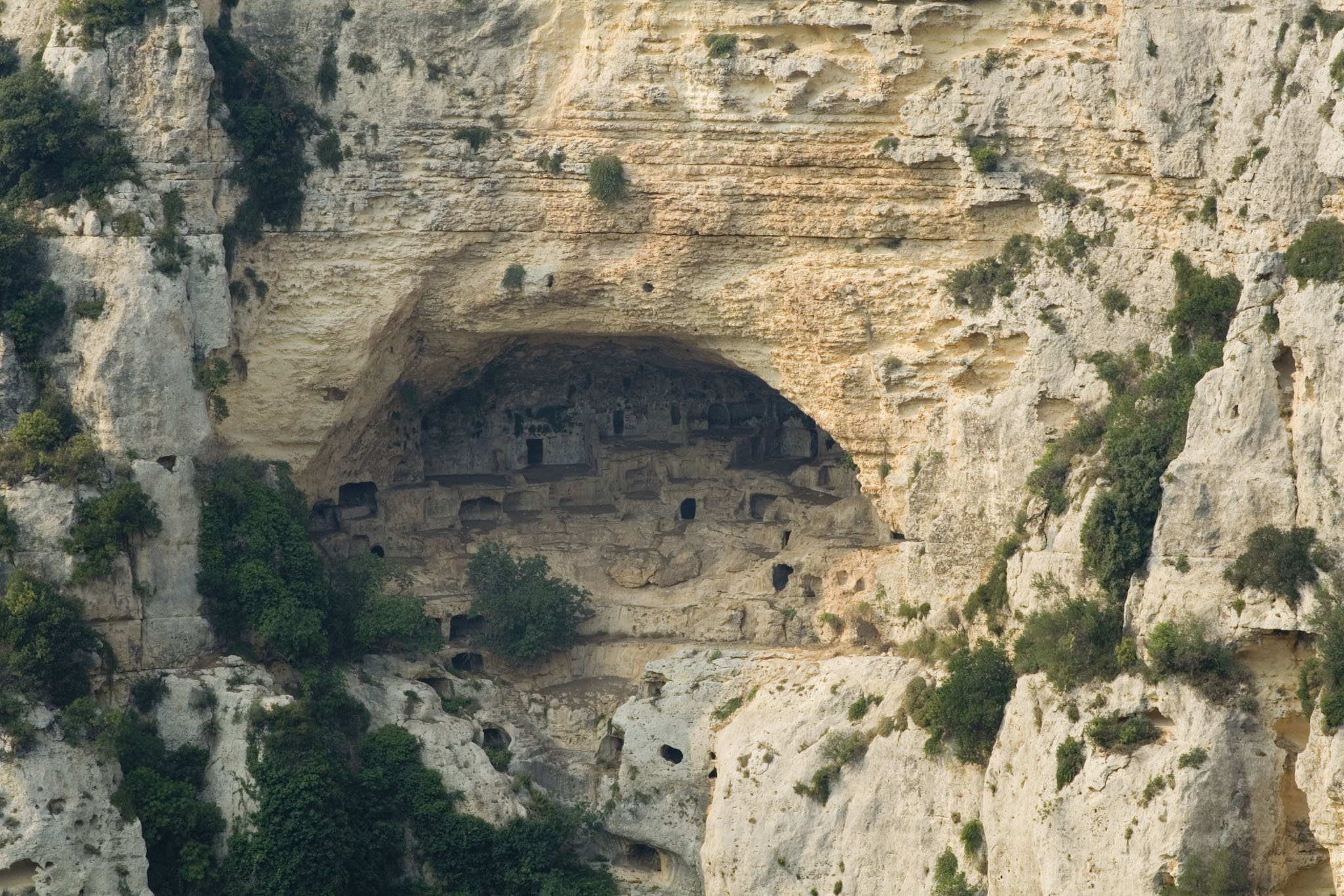 Cava grande del Cassibile, Sicily